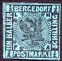 Timbre de Bergedorf, 1/2 Schilling sur papier bleu